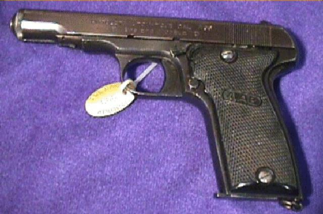 MAB Model D pistol